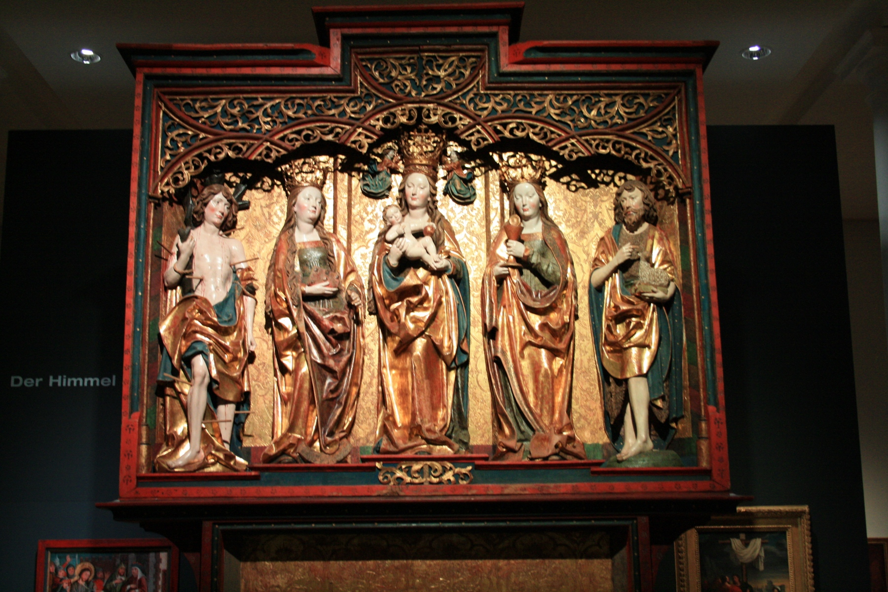 Rother Altar; Gotik; Marienretabel (Altaraufsatz mit Maria im Zentrum); Werkstatt Niklaus Weckmann (1481–1526) Ulm; Lindenholz; Figuren: Sebastian, Katharina, Maria mit Jesuskind, Barbara und Johannes der Täufer